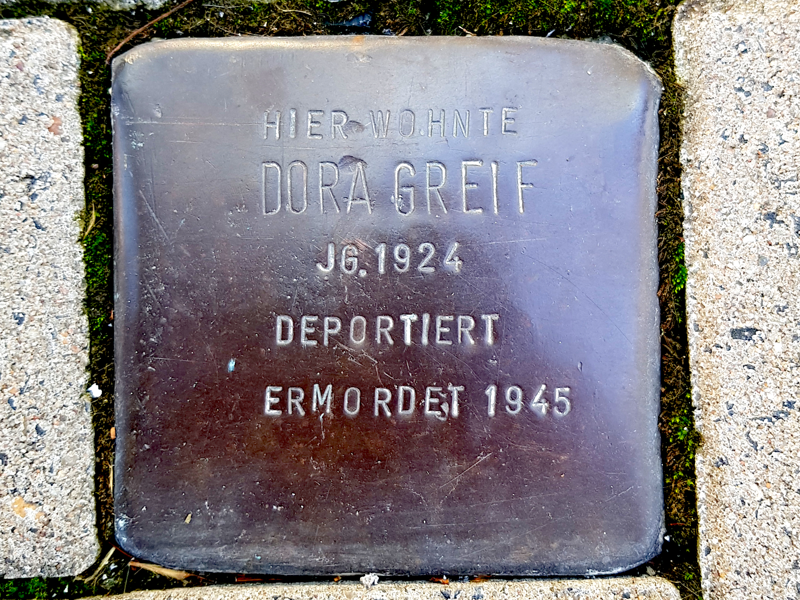 Stolperstein für Dora Greif, Jg. 1924, deportiert, ermordet 1945